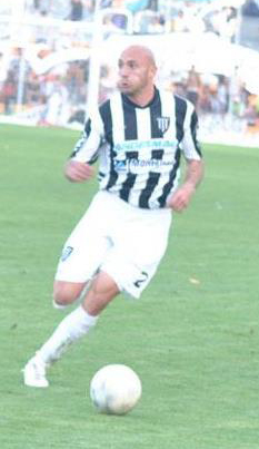 Mauricio Mazzetti con la camiseta de Gimnasia y Esgrima (Mza.).